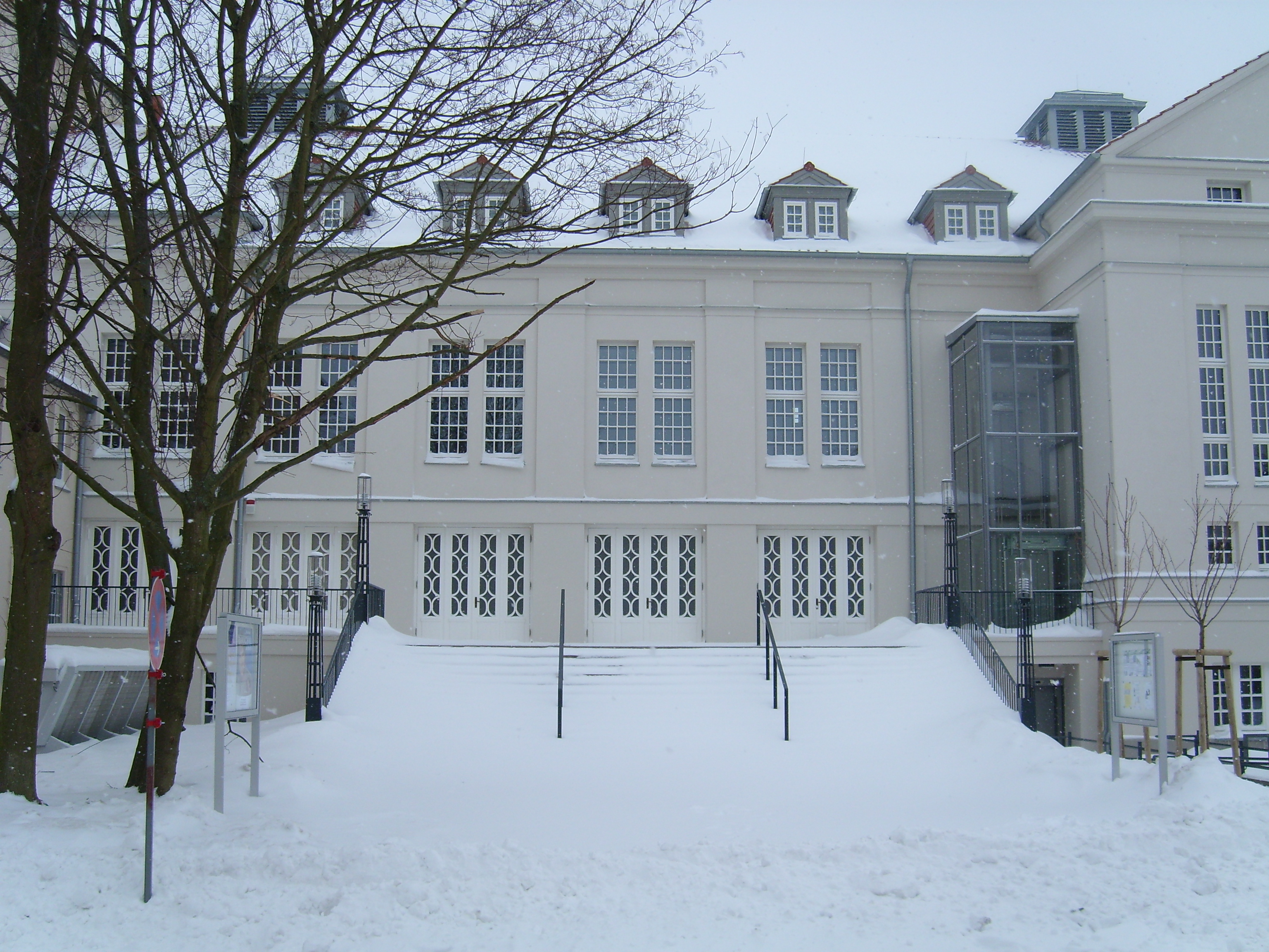 Frontseite der renovierten Stadthalle